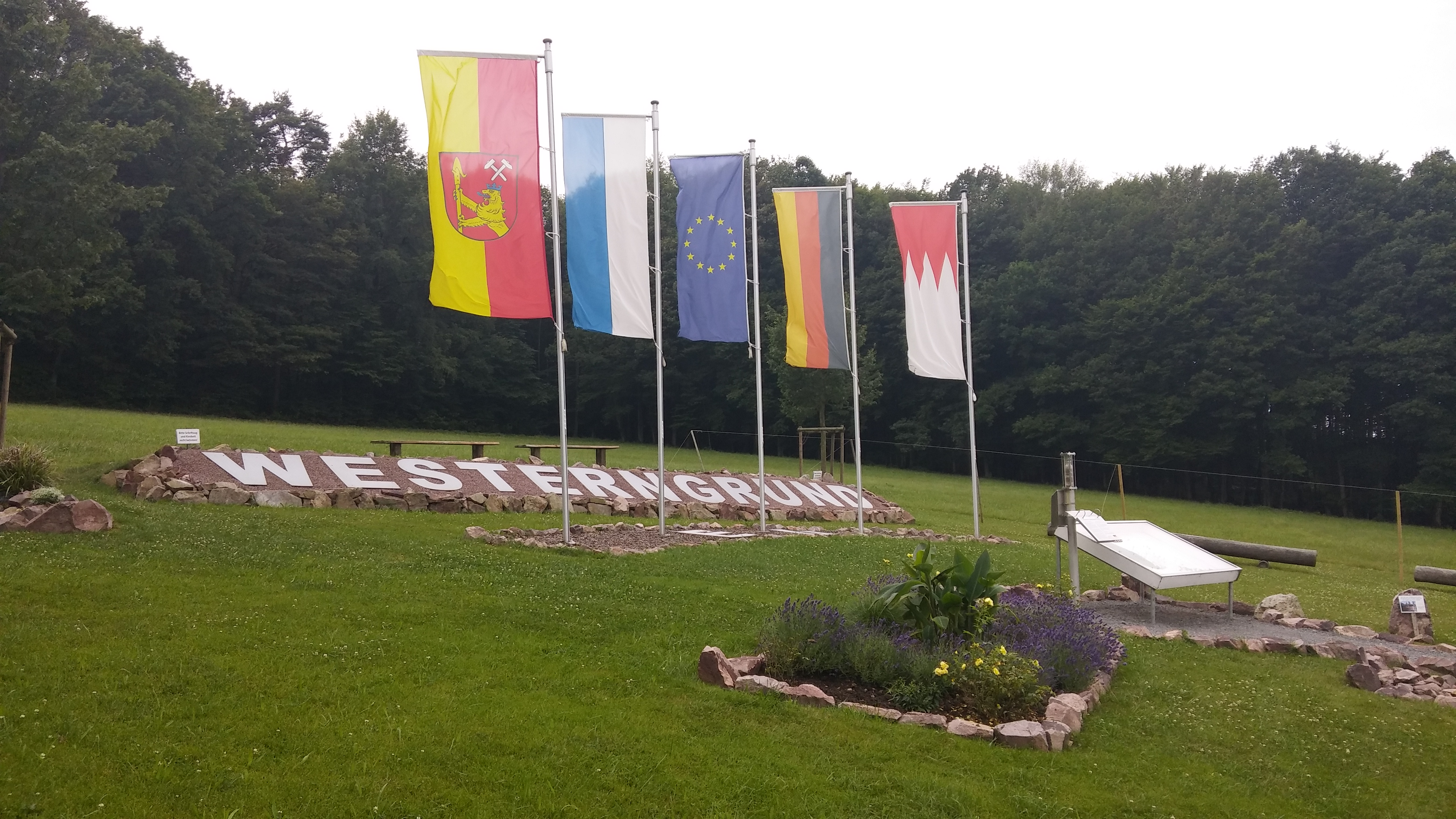 Übersichtsfoto des Europäischen Mittelpunktes vor Brexit